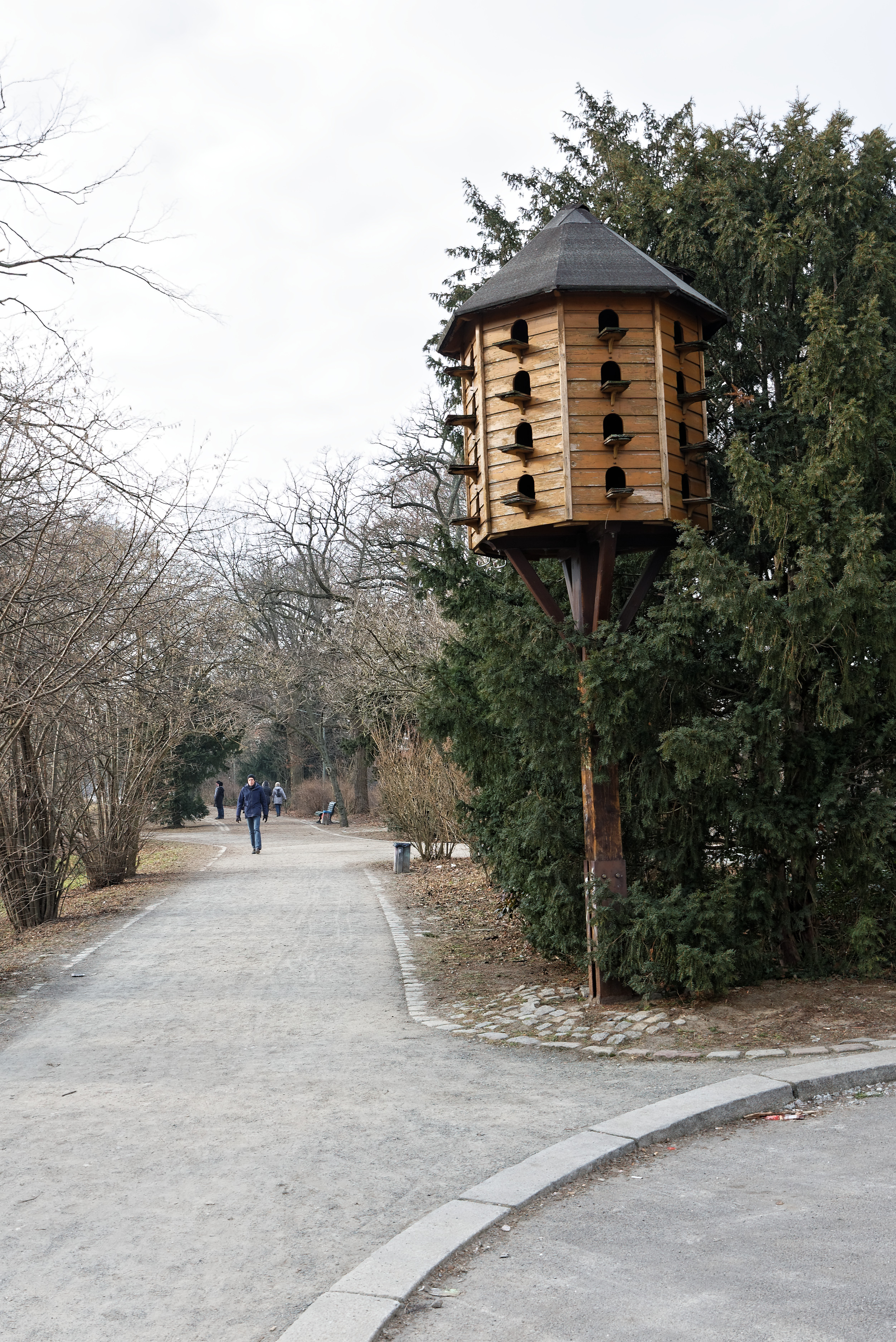 Vogelhaus am Fennsee